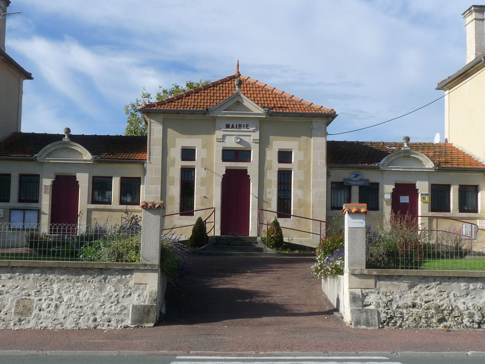 Mairie de Léoville, Charente-Maritime, France